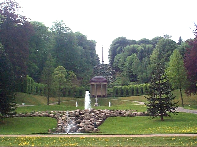 Amphitheater in der Klever Gartenanlage des Johann Moritz von Nassau-Siegen